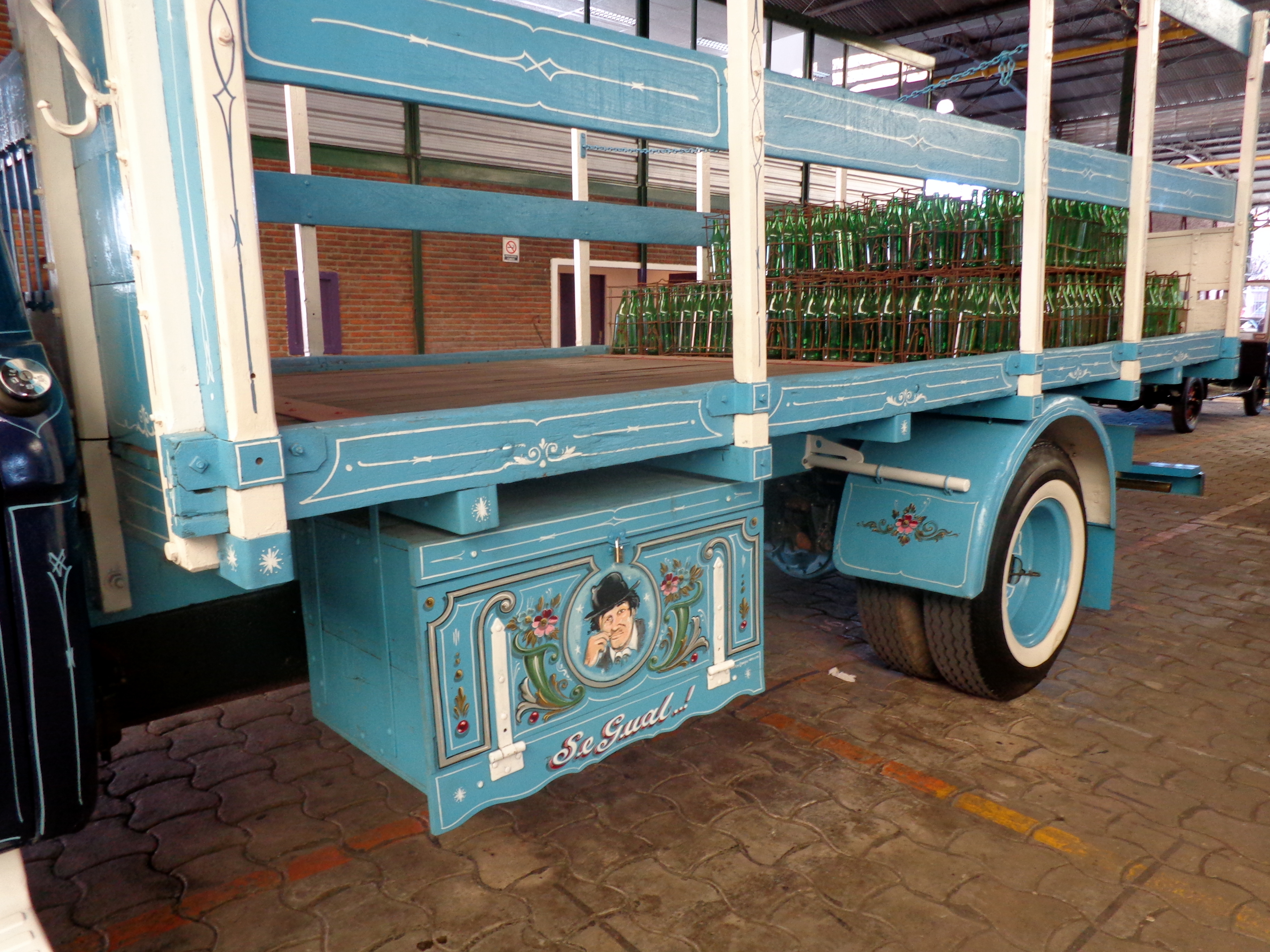 Camión de reparto Ford fileteado. Buenos Aires, Argentina